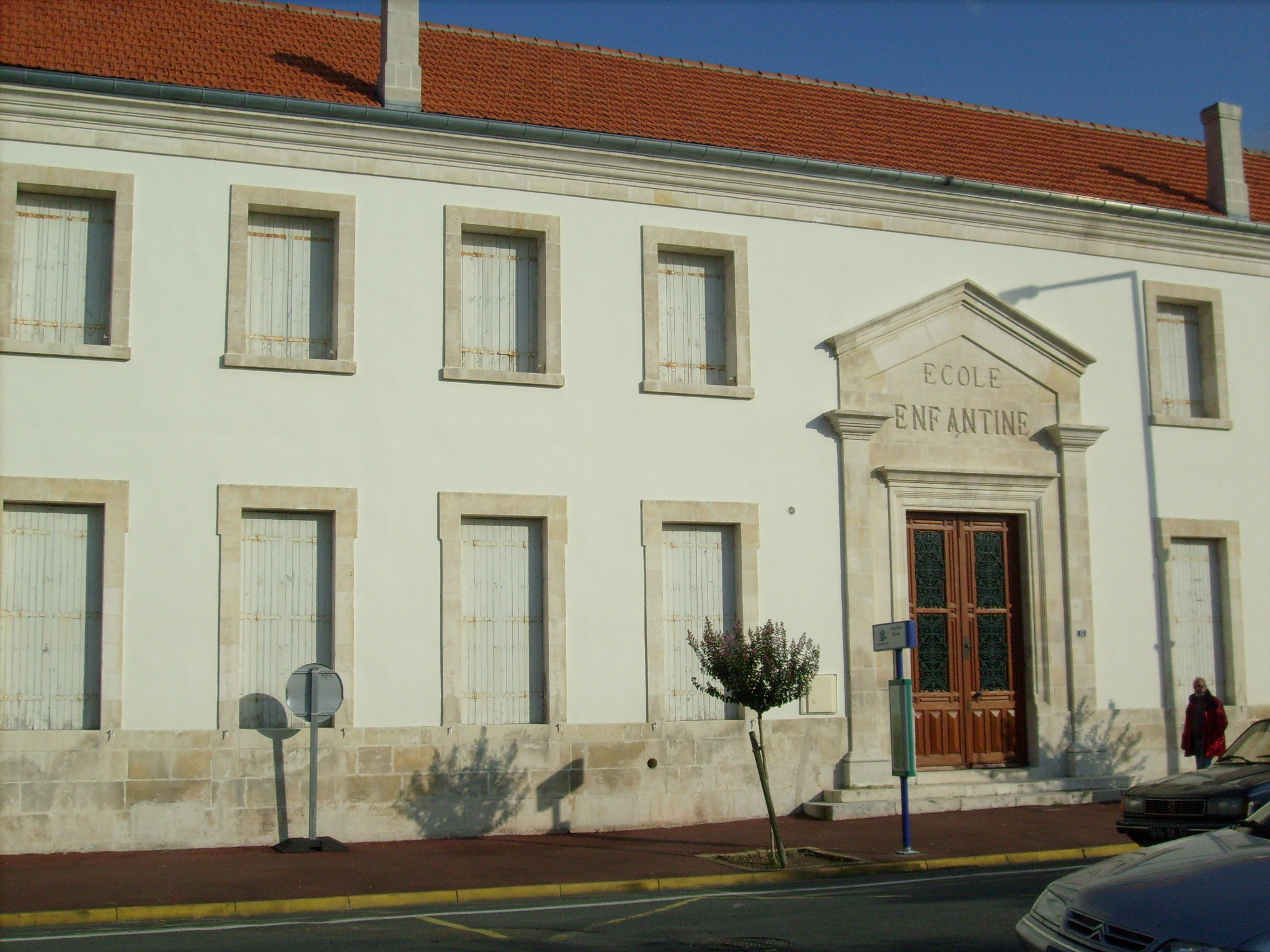 L'ancienne école de Saujon